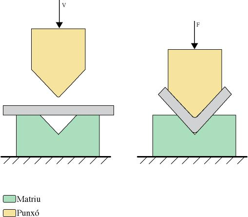 Analisis doblado en V